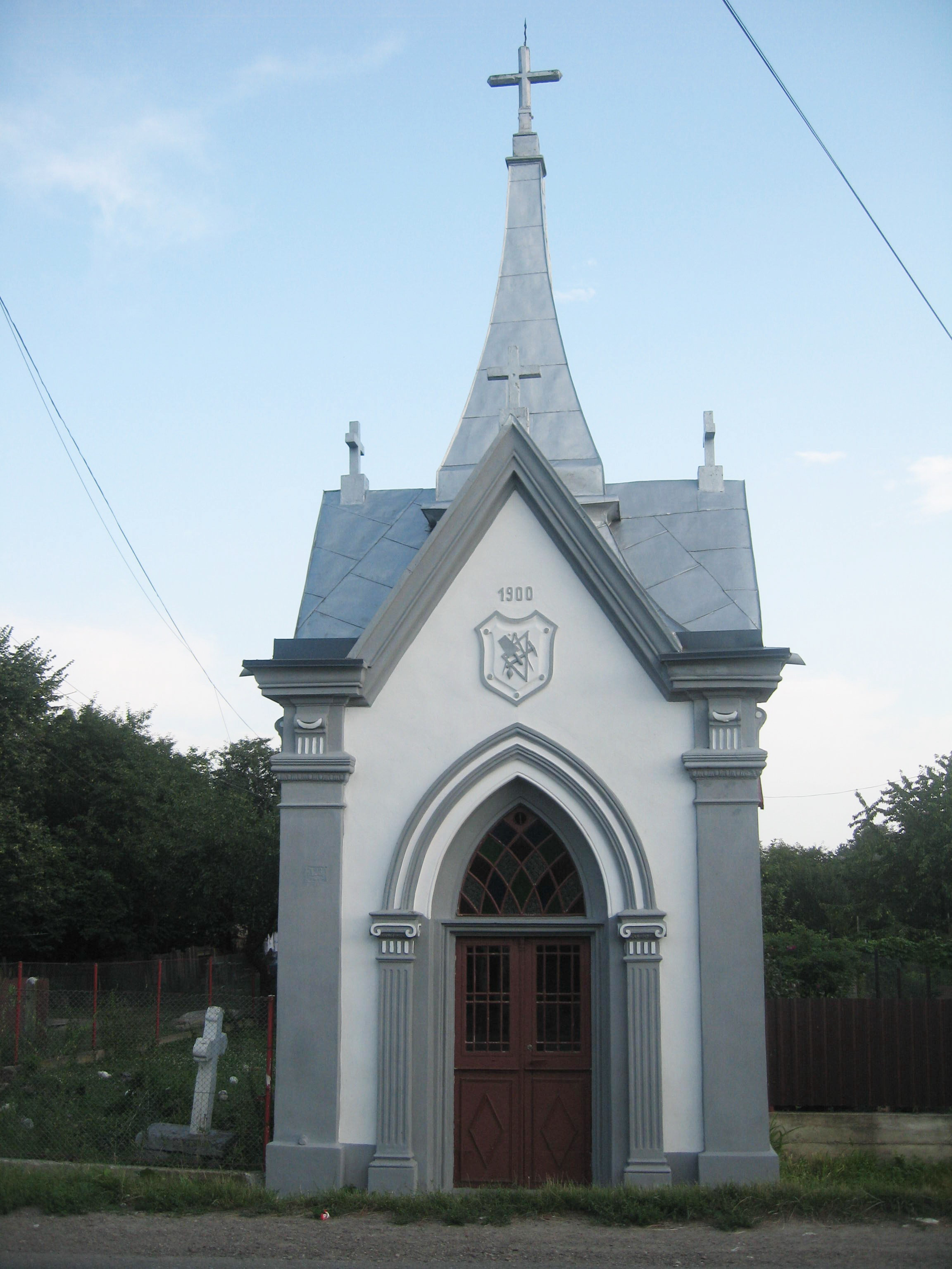 Capela Sf. Rochus din Radauti